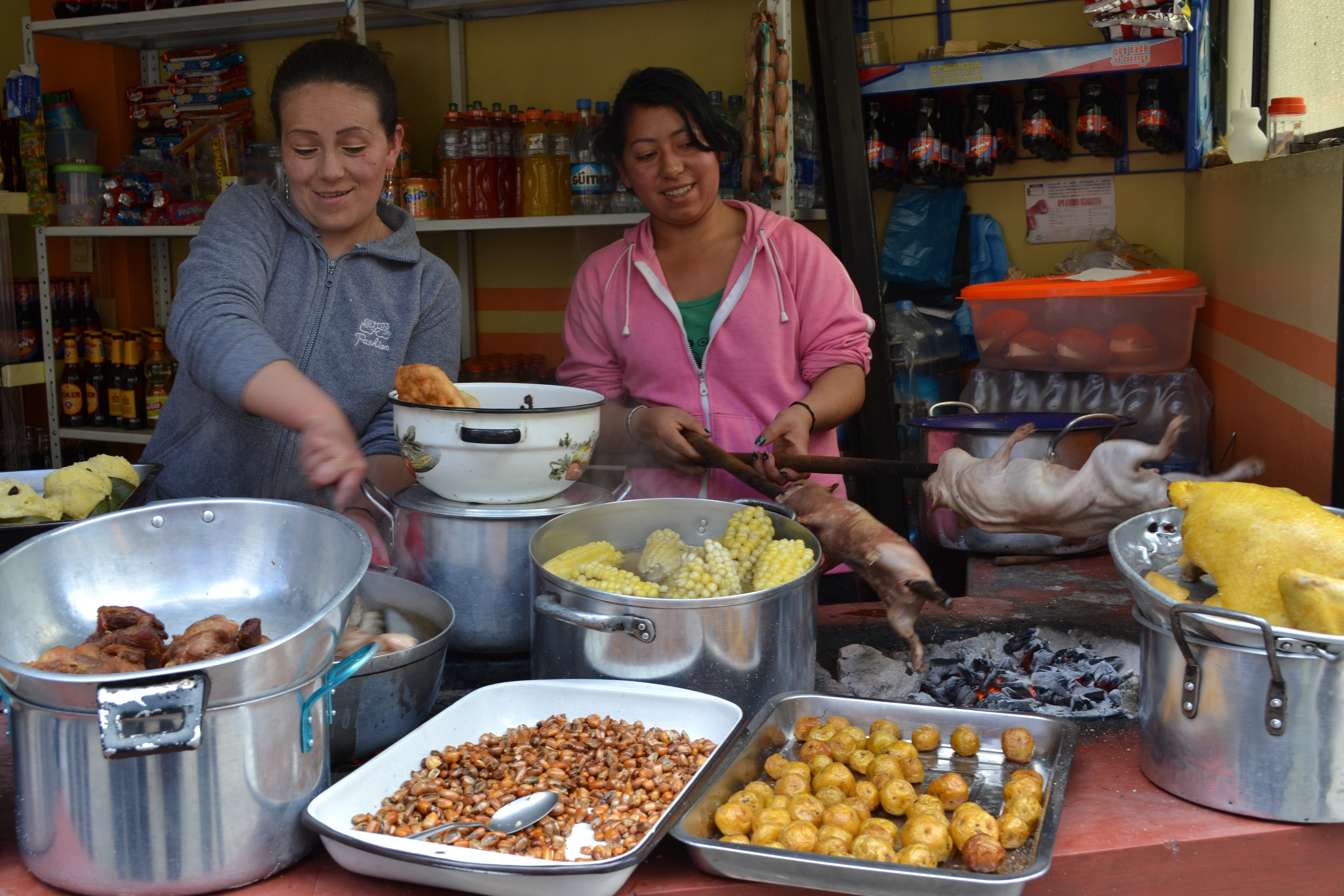 Mujeres preparando comida típica nariñense: cuyes azados, gallina, papa criolla, habas fritas, chicharrones, envueltos